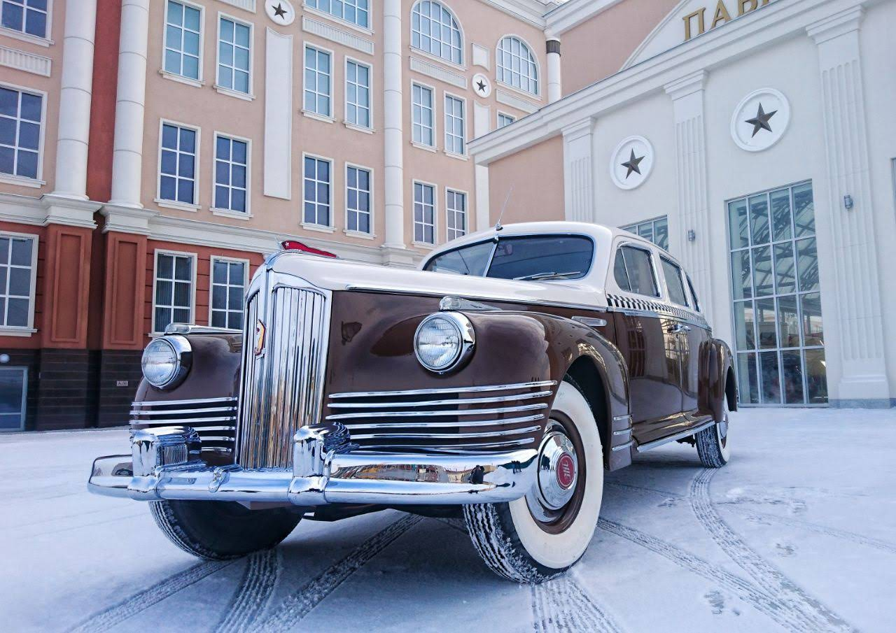 XXVIII выставка "Олдтаймер-галерея" в московском парке «Сокольники». ЗИС-110 «Такси».